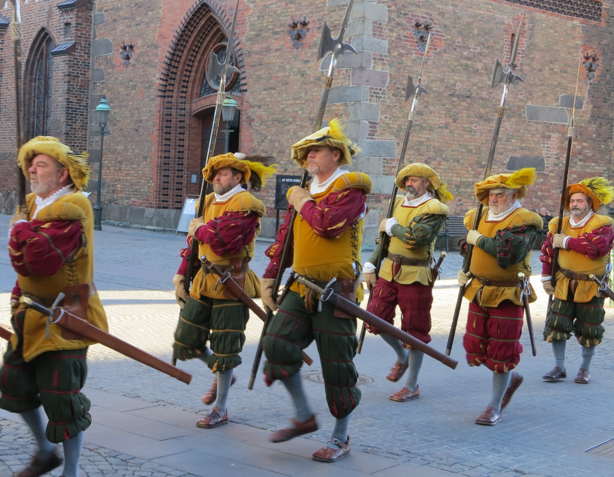 Malmöhusgardet i uniformer från 1500-talet